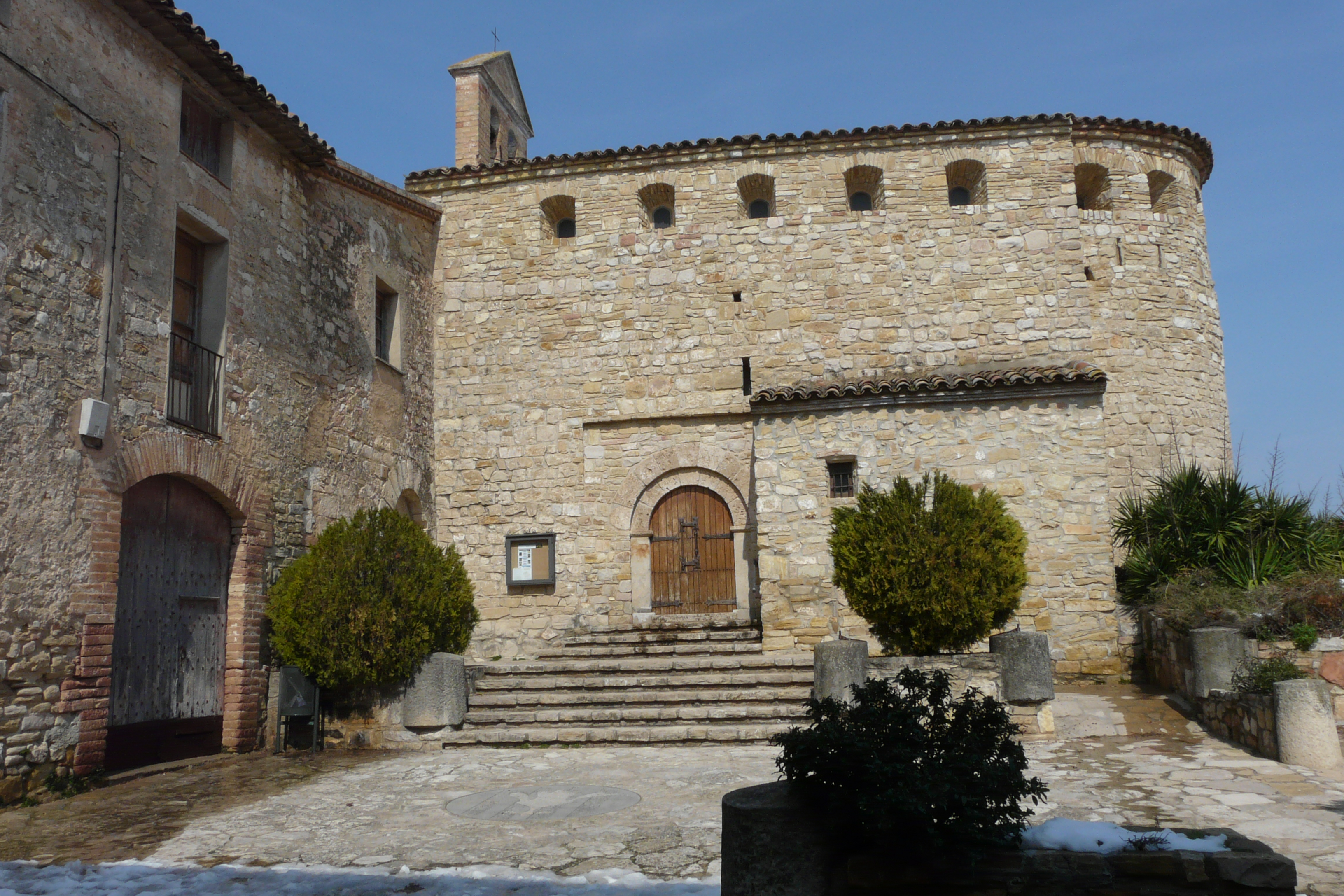 Vista exterior de l'església romànica de Vilanova d'Espoia al municipi de la Torre de Claramunt (Anoia - Catalunya)